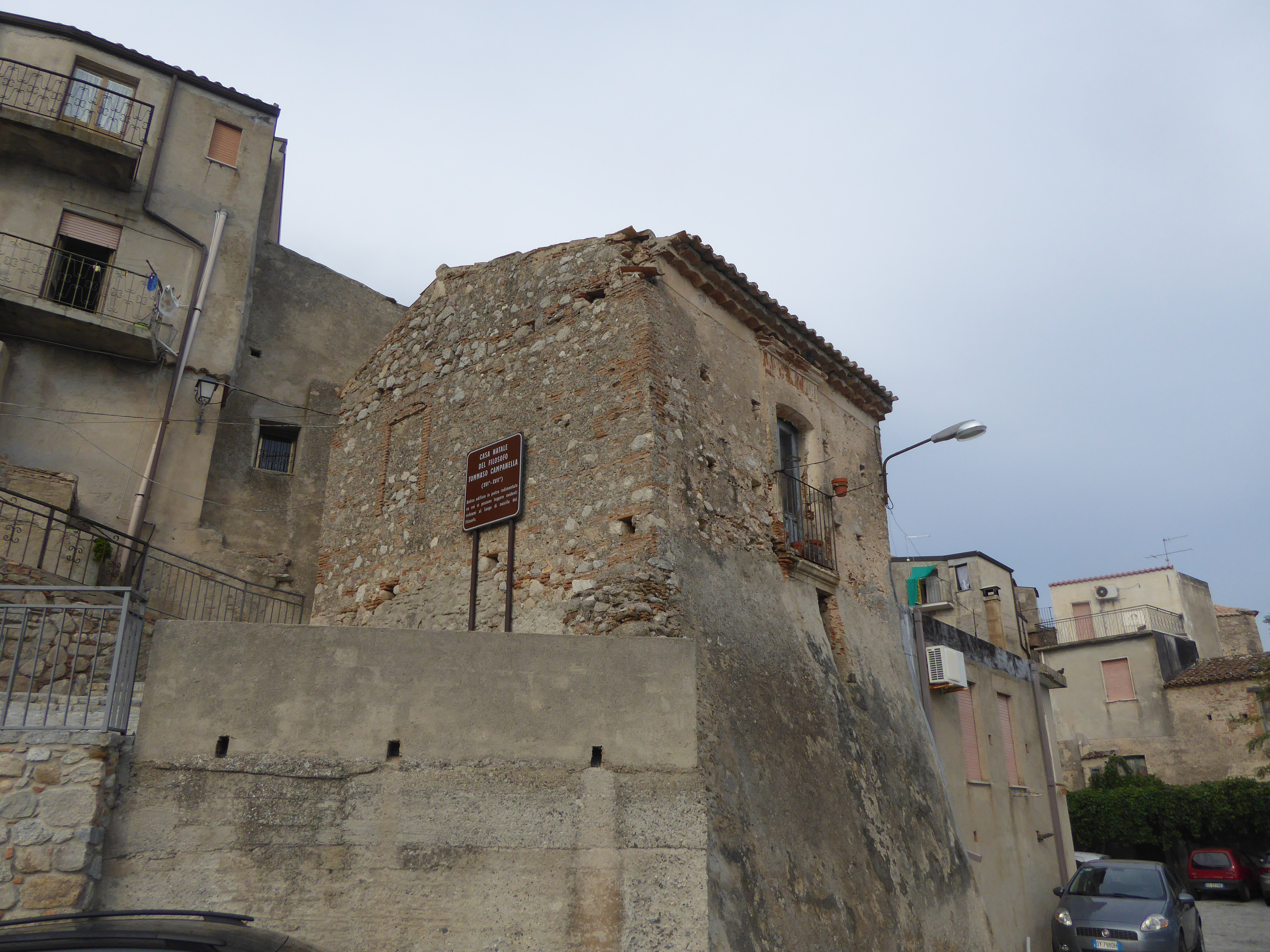 Casa natale di Tommaso Campanella a Stignano (agosto 2018)